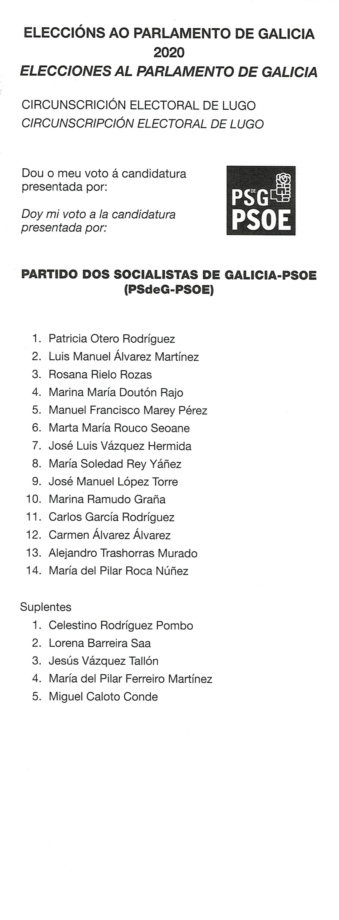 Papeletas electorais Eleccións ao Parlamento de Galicia 2020 circunscrición electoral de Lugo - xullo - PSdeG PSOE